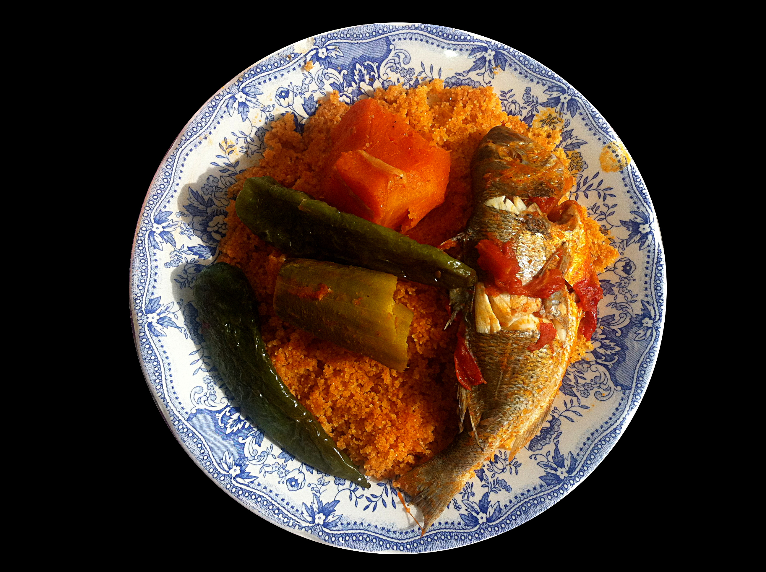 Plat de couscous avec du poisson (dorade d'élevage), Tunisie